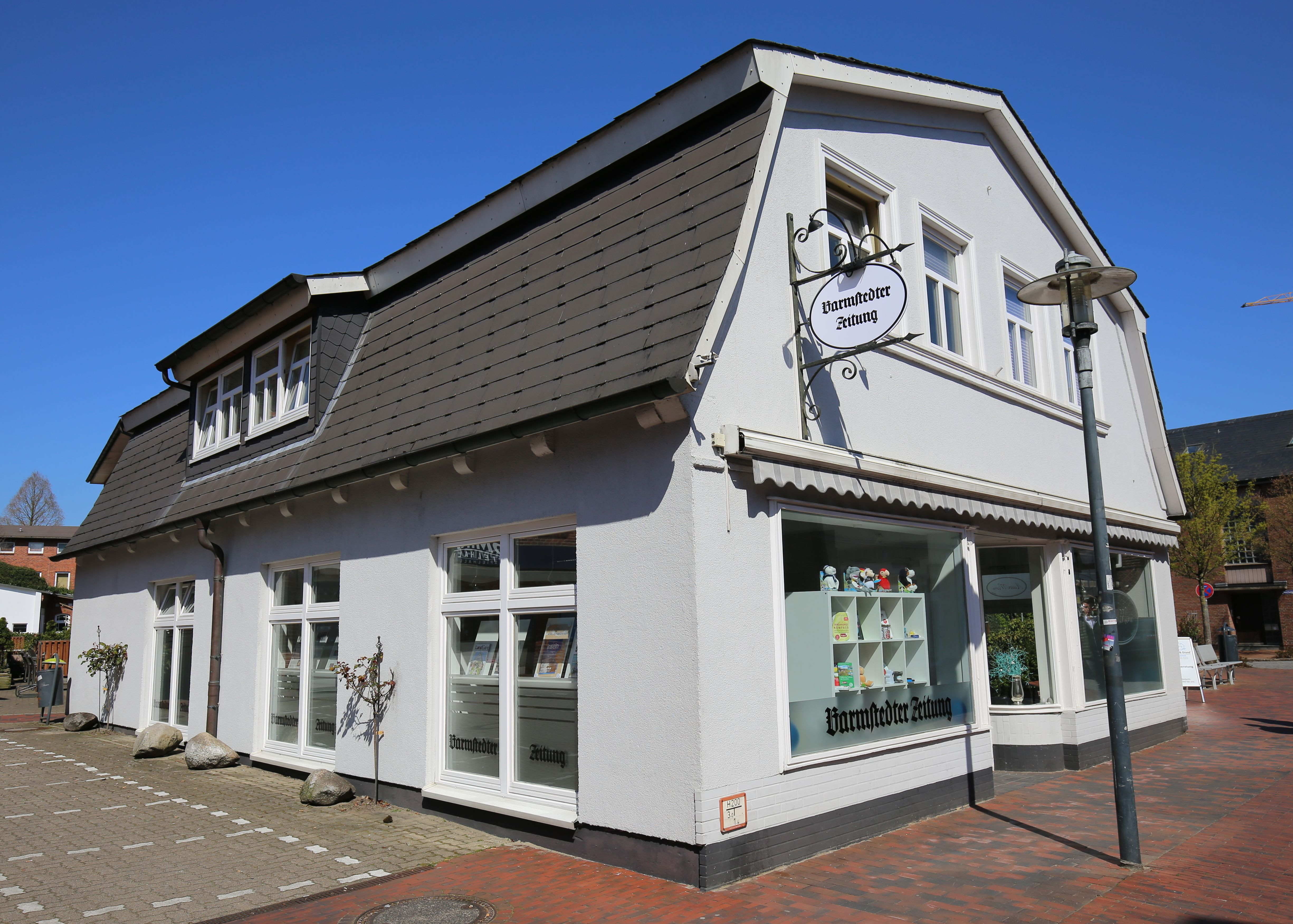 Geschäftsstelle der Barmstedter Zeitung